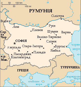 Bulgar-mapa-Ukraiinskoyu.png: Мапа Болгарії.